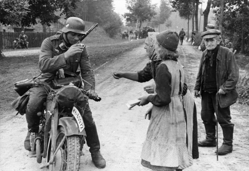 Polen, Zivilisten, Soldat auf Krad Volksdeutsche reichen ihren Befreiern einen frischen Trunk "Fr" OKW Scherl Bilderdienst, Berlin 3.9.1939 11111-39 [Polen.- Alte Frauen neben trinkendem deutschem Soldaten auf einem Motorrad (Kradmelder)]